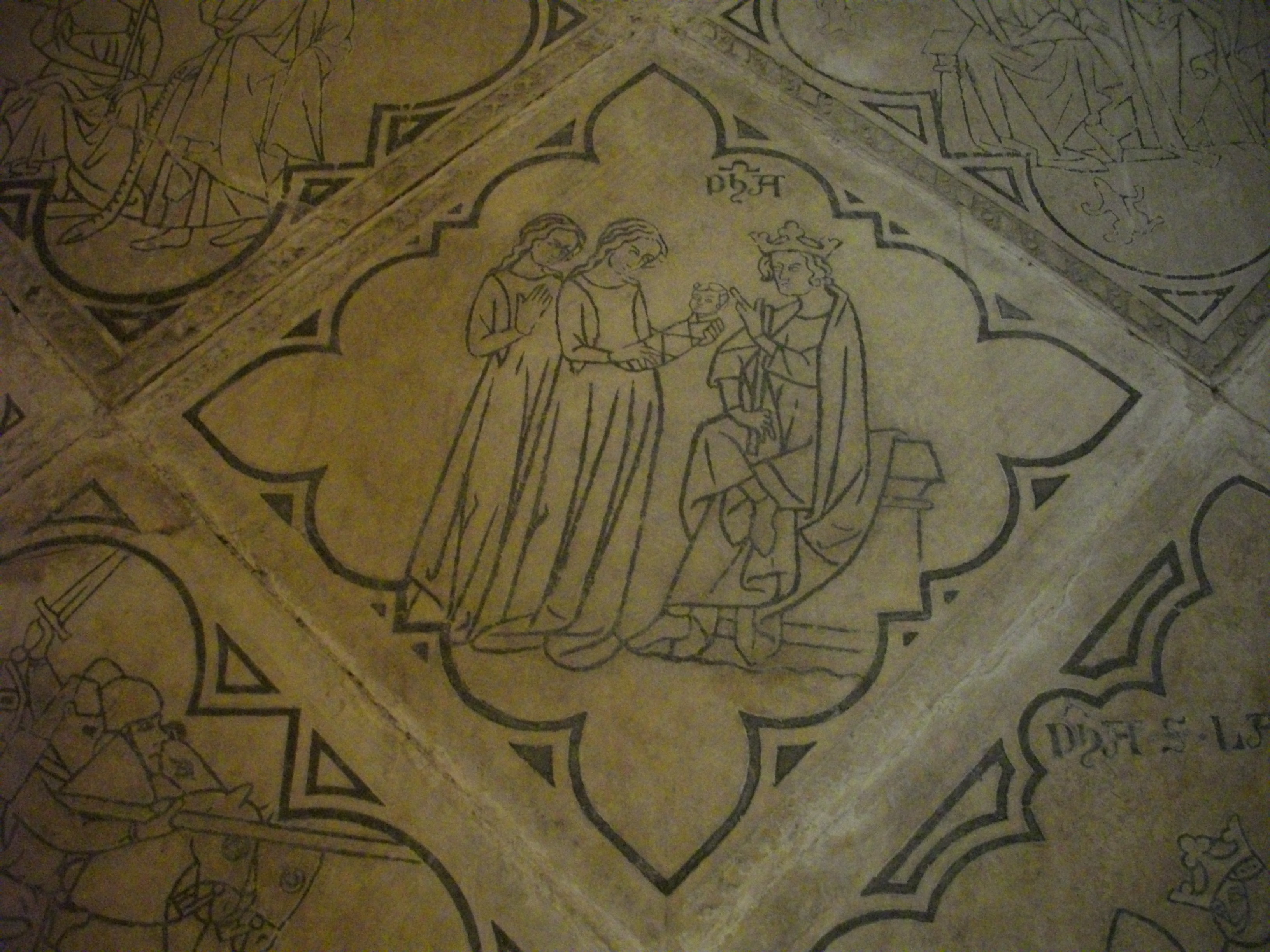 Dallage de la chapelle Saint-Éloi, en l'ancienne église Siant-Nicaise de Reims (Marne, France), maintenant conservé en la Basilique Saint-Remi : Le jugement de Salomon